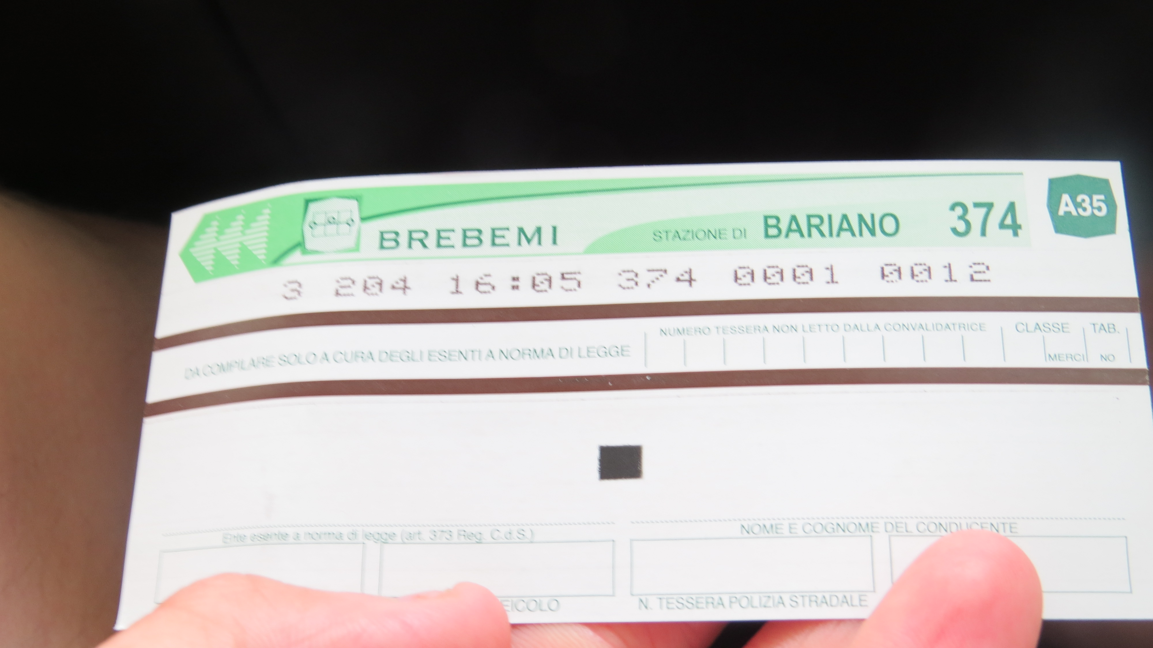 Biglietto per il BreBeMi